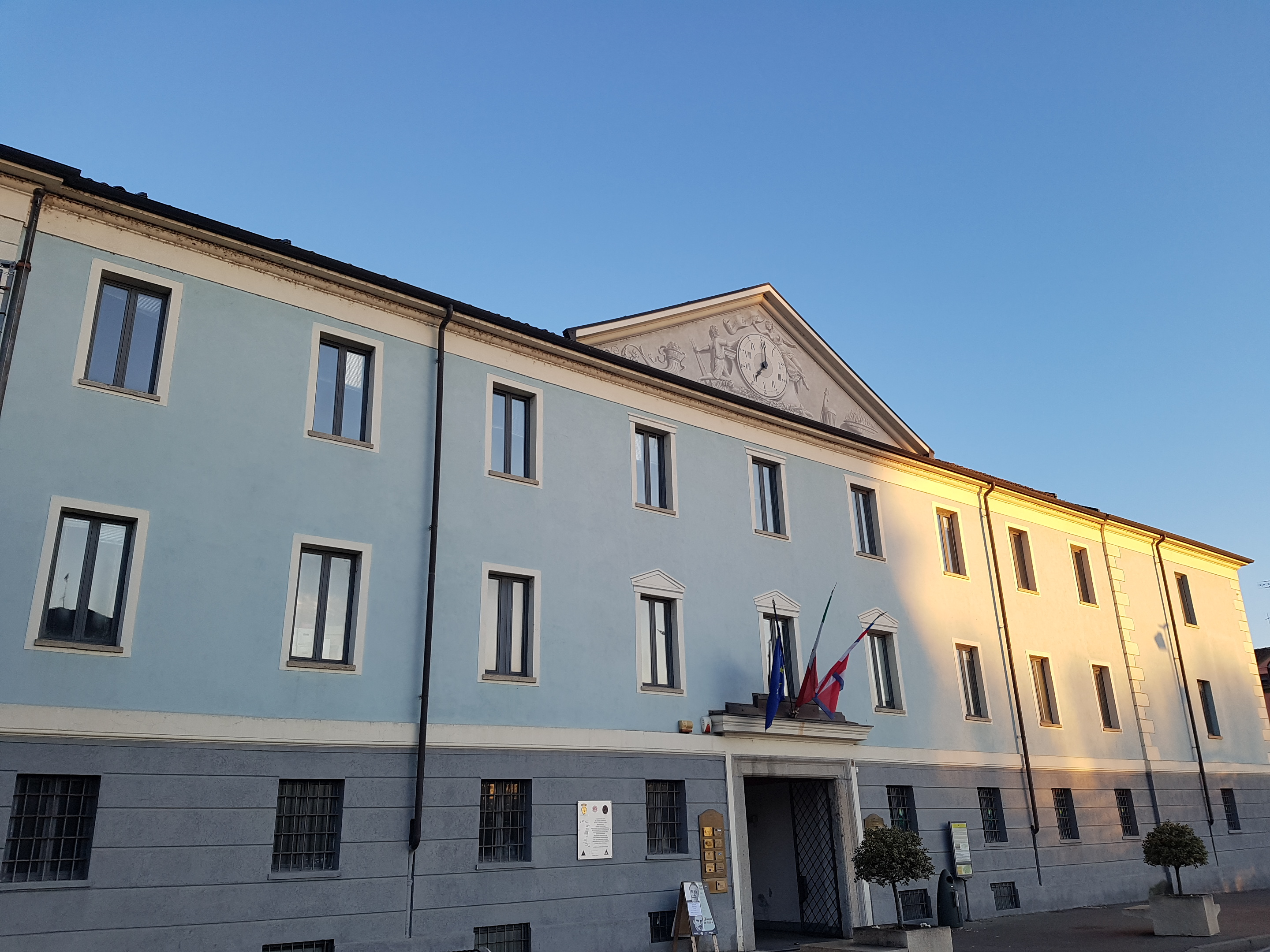 Palazzo dell'Economia e del Lavoro “Luigi Einaudi“ (XVIII sec.), Chivasso, Piemonte